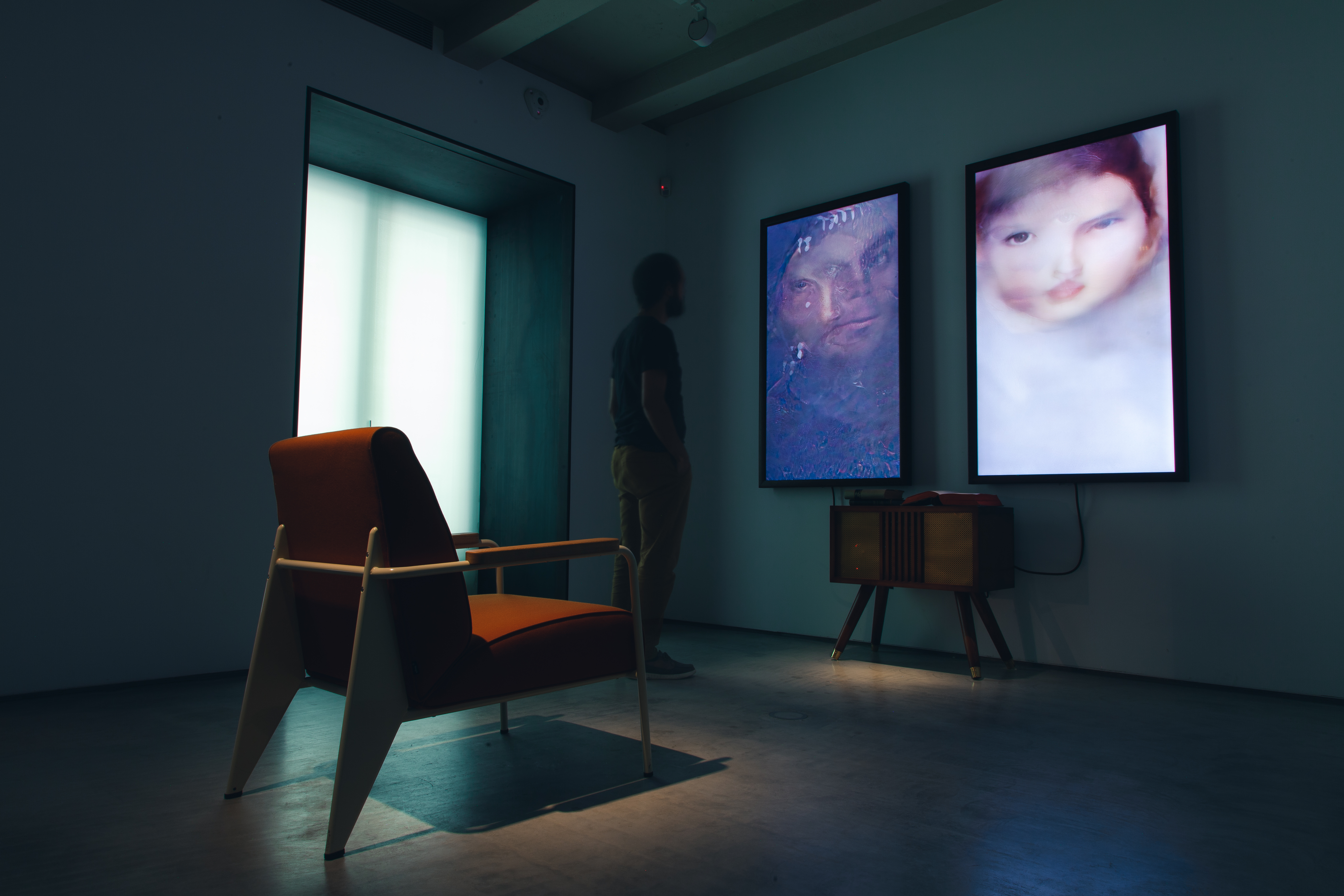 Memories of Passersby by Mario Klingemann. Courtesy Onkaos